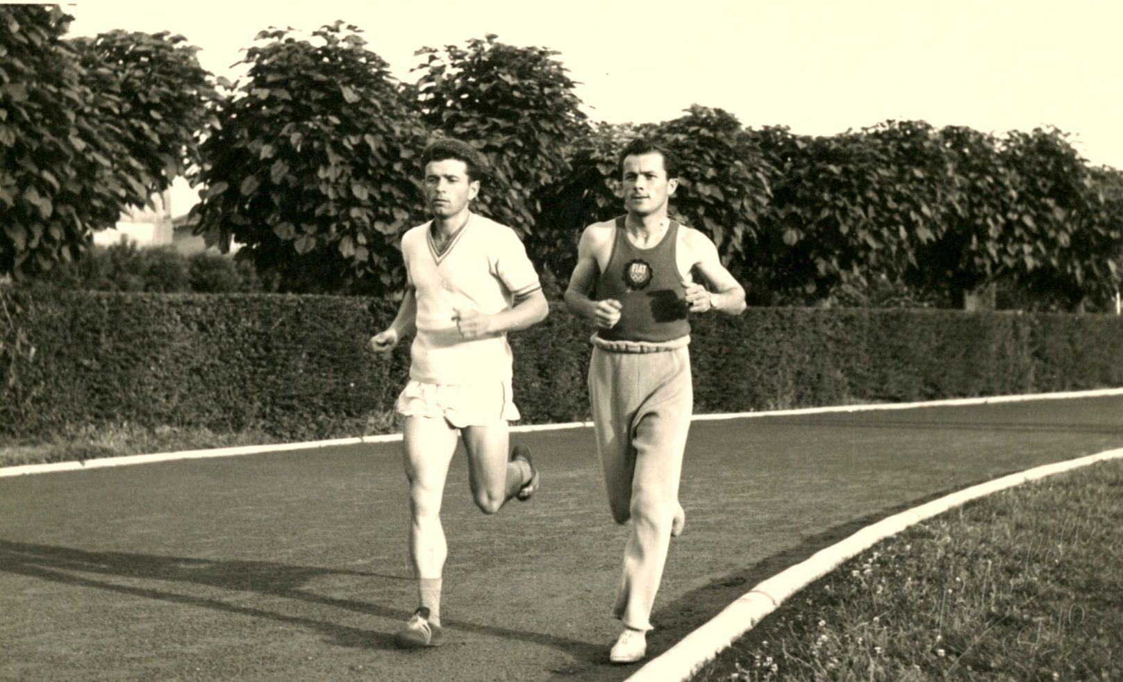 Foto scattata a Giacomo Peppicelli durante un allenamento in pista negli anni '50